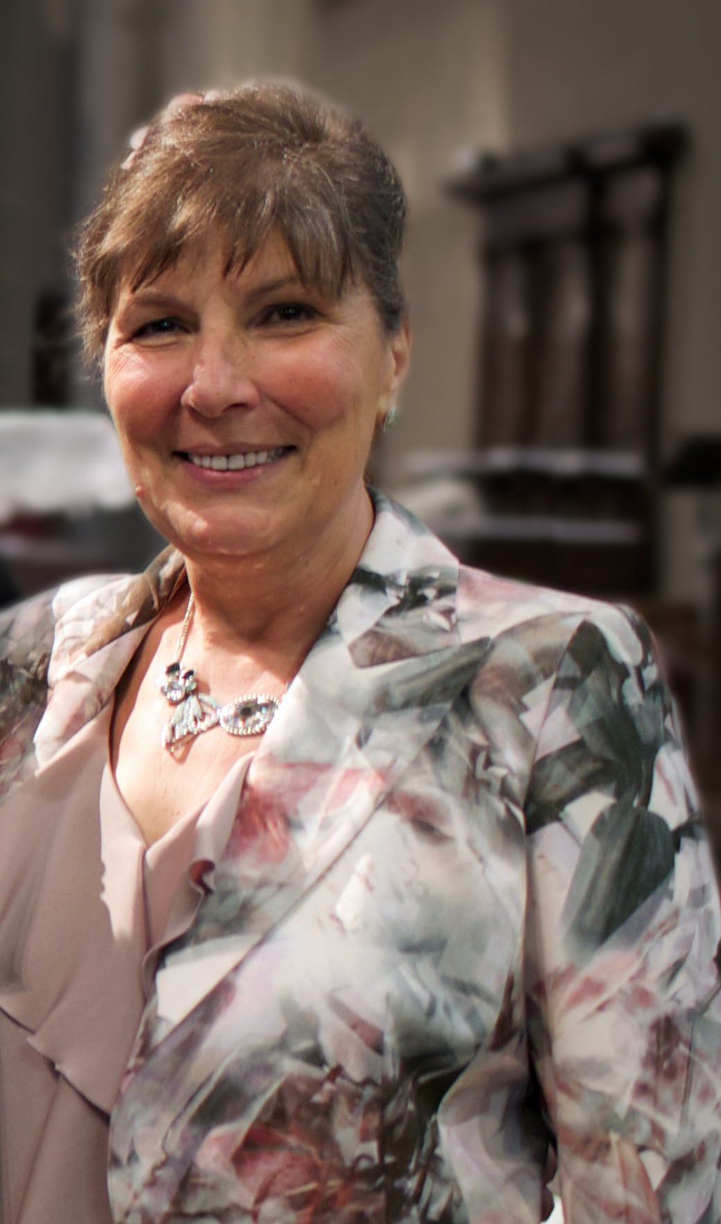 Onorevole Daniela Gasparini